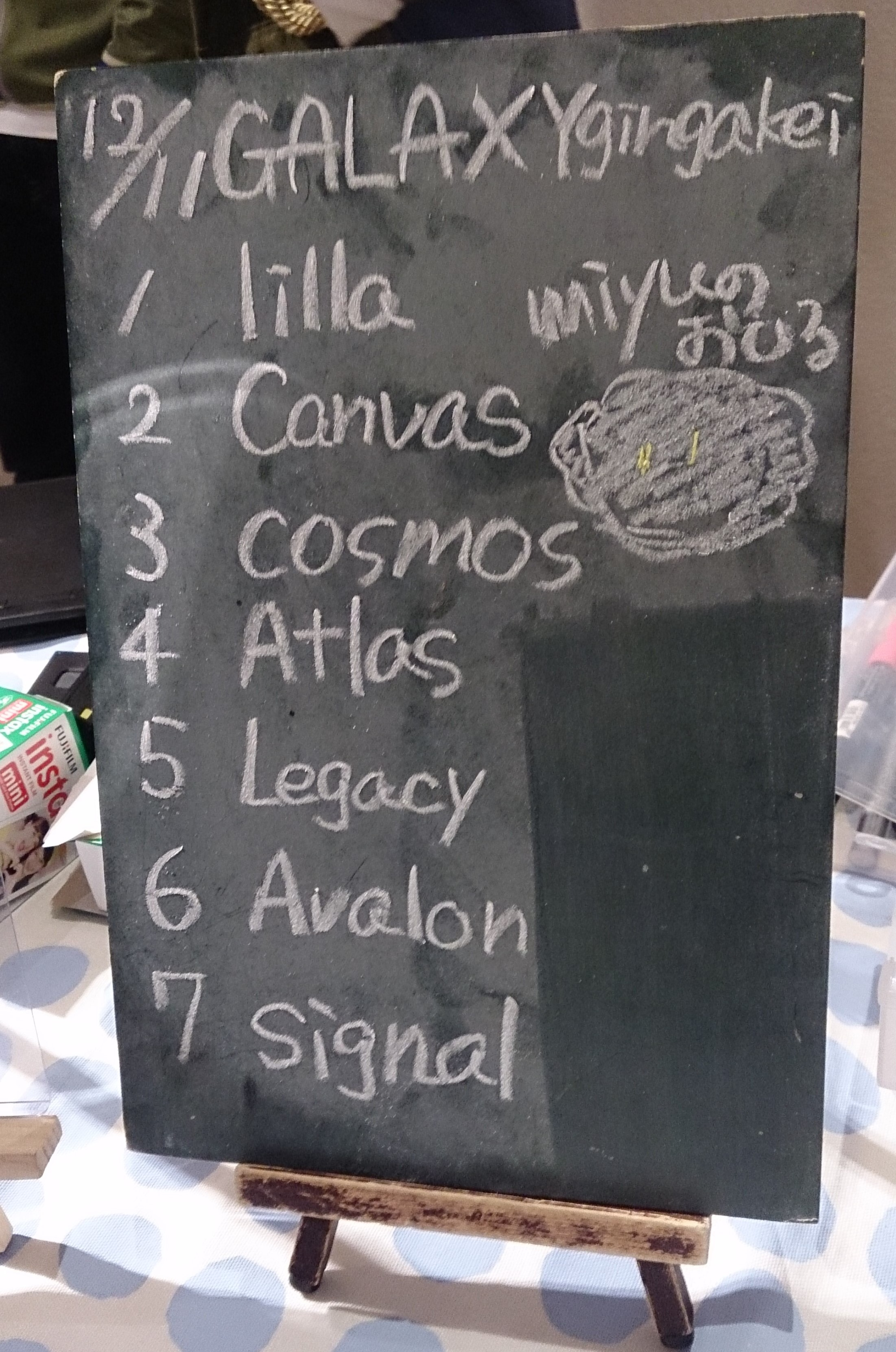 amiinAセトリボード(20161211(1))